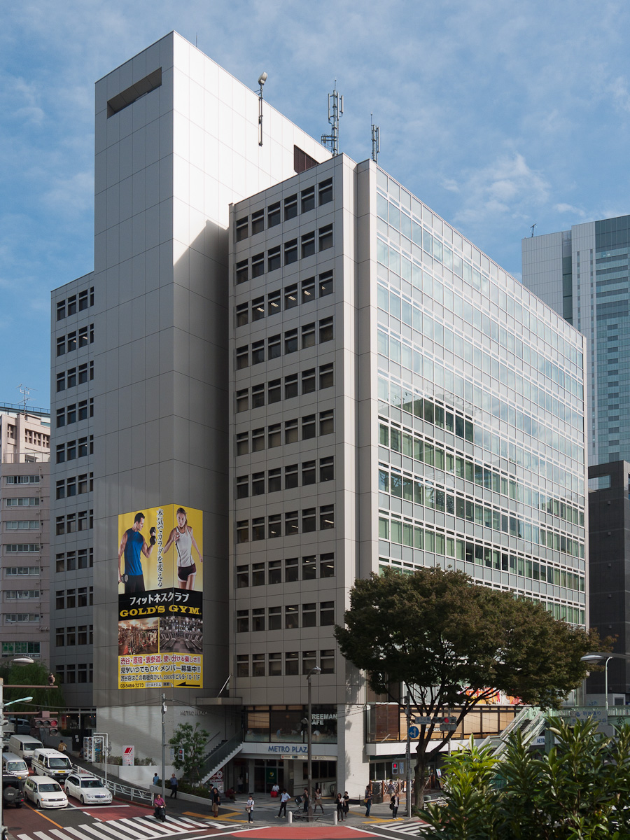 渋谷地下鉄ビル（メトロプラザ）。東京都渋谷区渋谷1丁目。